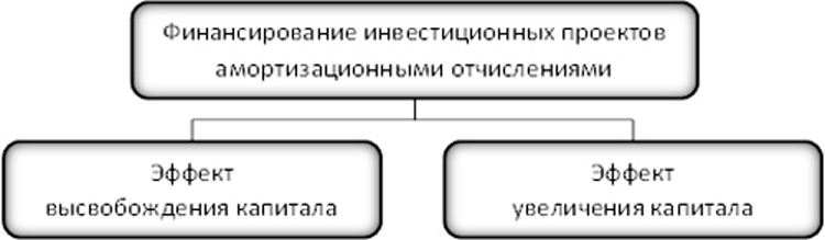 Финансирование инвестиционных проектов